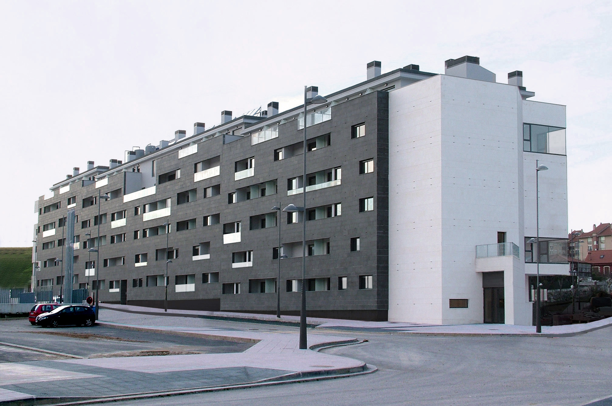 130 Viviendas de Protección Oficial construidas en Astillero (Cantabria, España). 1º Premio en Concurso de ideas VPO bioclimáticas promovido por el Ayuntamiento de Astillero. Premio del Colegio Oficial de Arquitectos de Cantabria al mejor edificio de Vivienda Colectiva en 2010. Estudio Enrique Arruti.